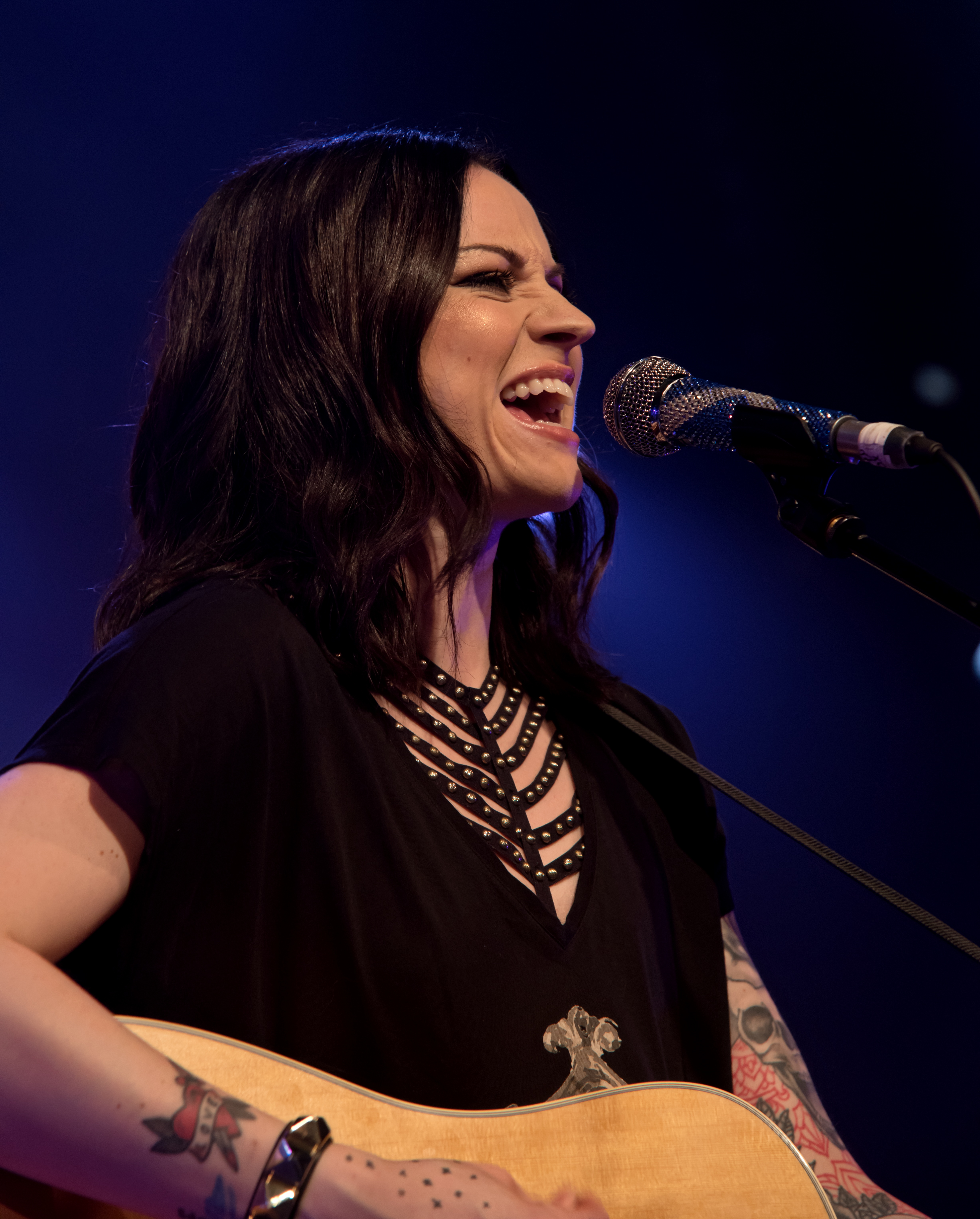 Bilder vom Zelt Musik Festival 2017 in Freiburg im Breisgau